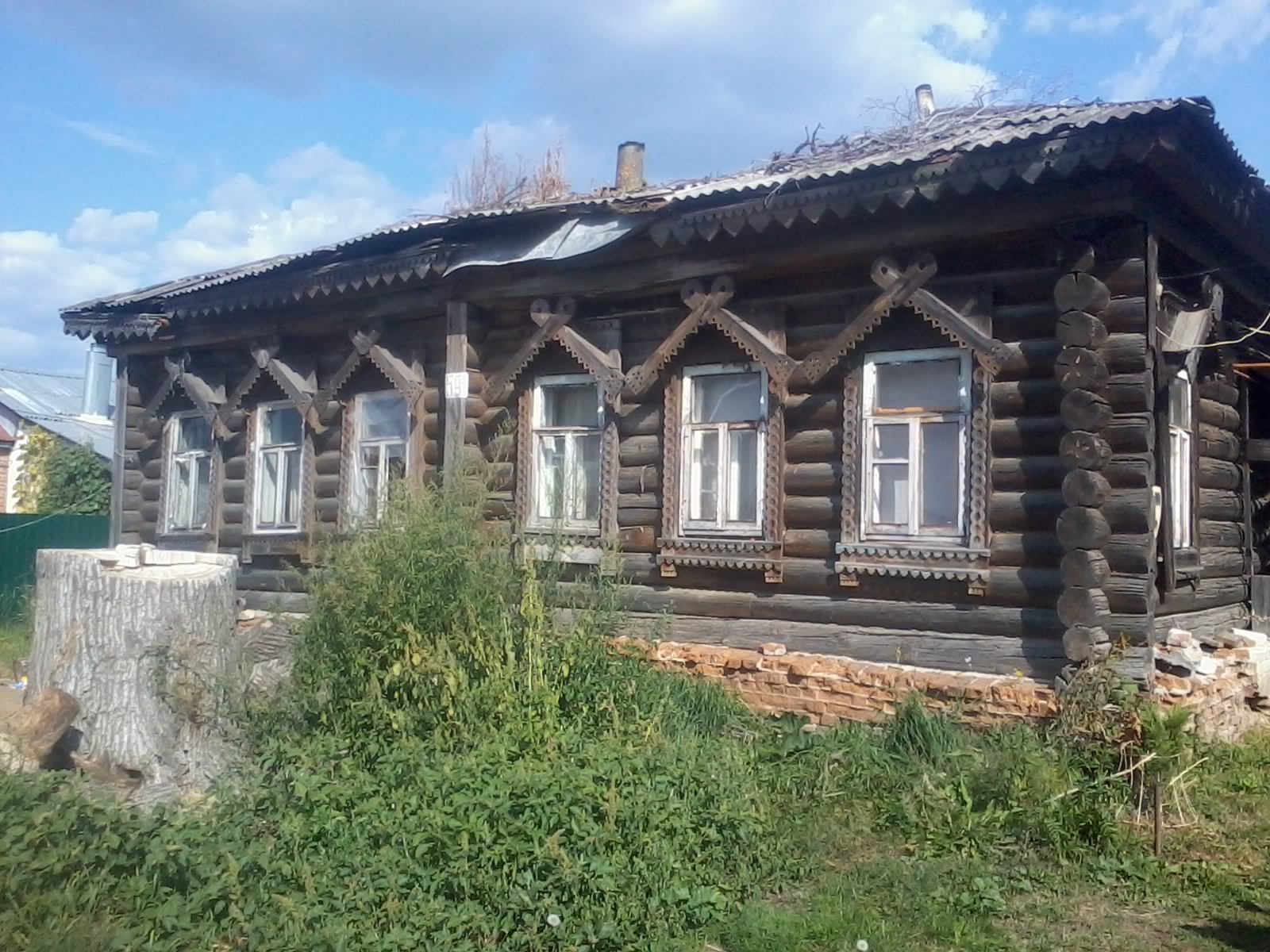 Сельский дом